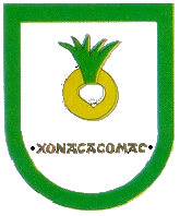 el escudo de este municipio poblano